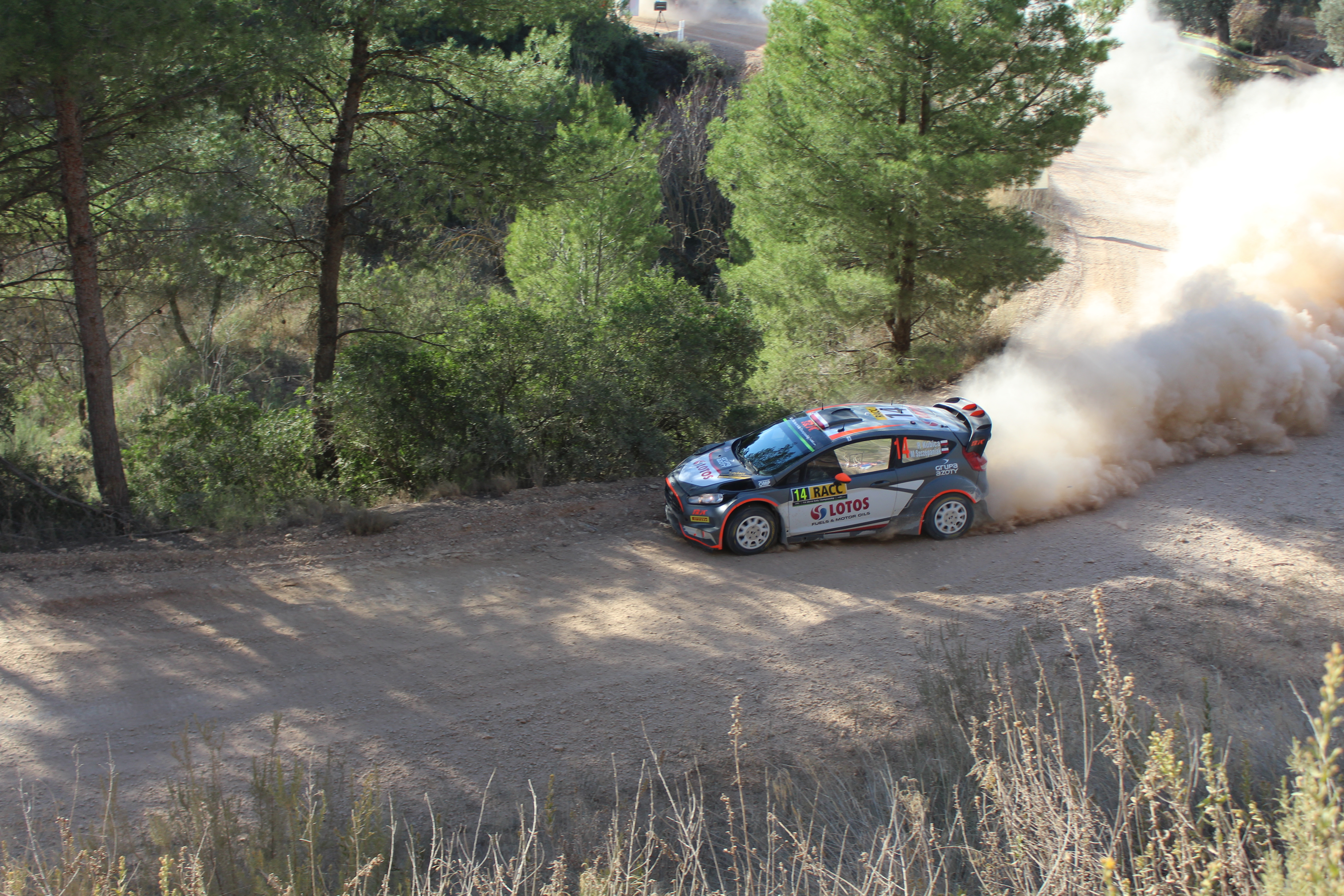 Robert Kubica podczas Rajdu Hiszpanii 2015